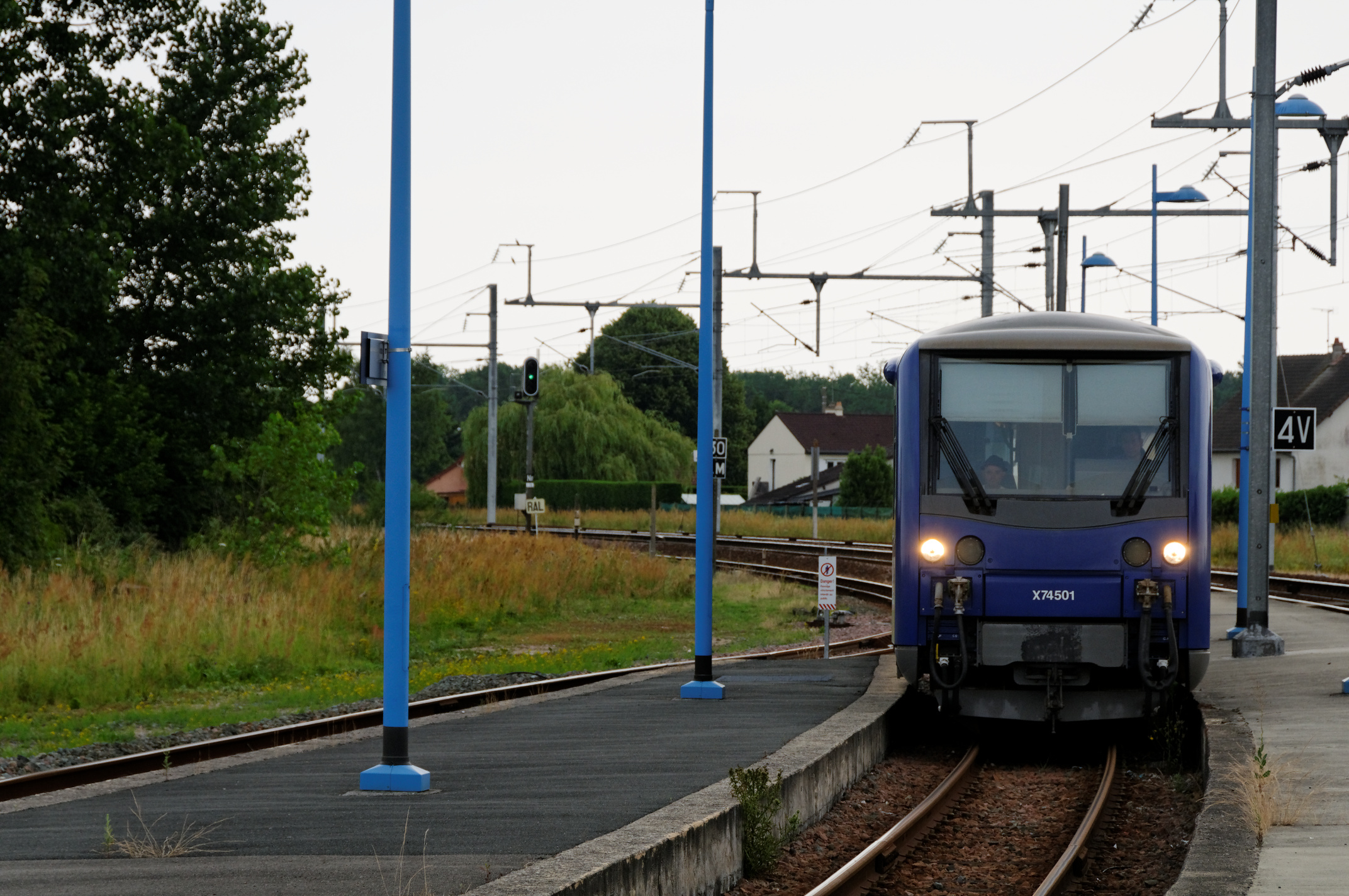 Autorail X 74501 (TER Centre) arrivant en gare de Gièvres, Loir-et-Cher, France